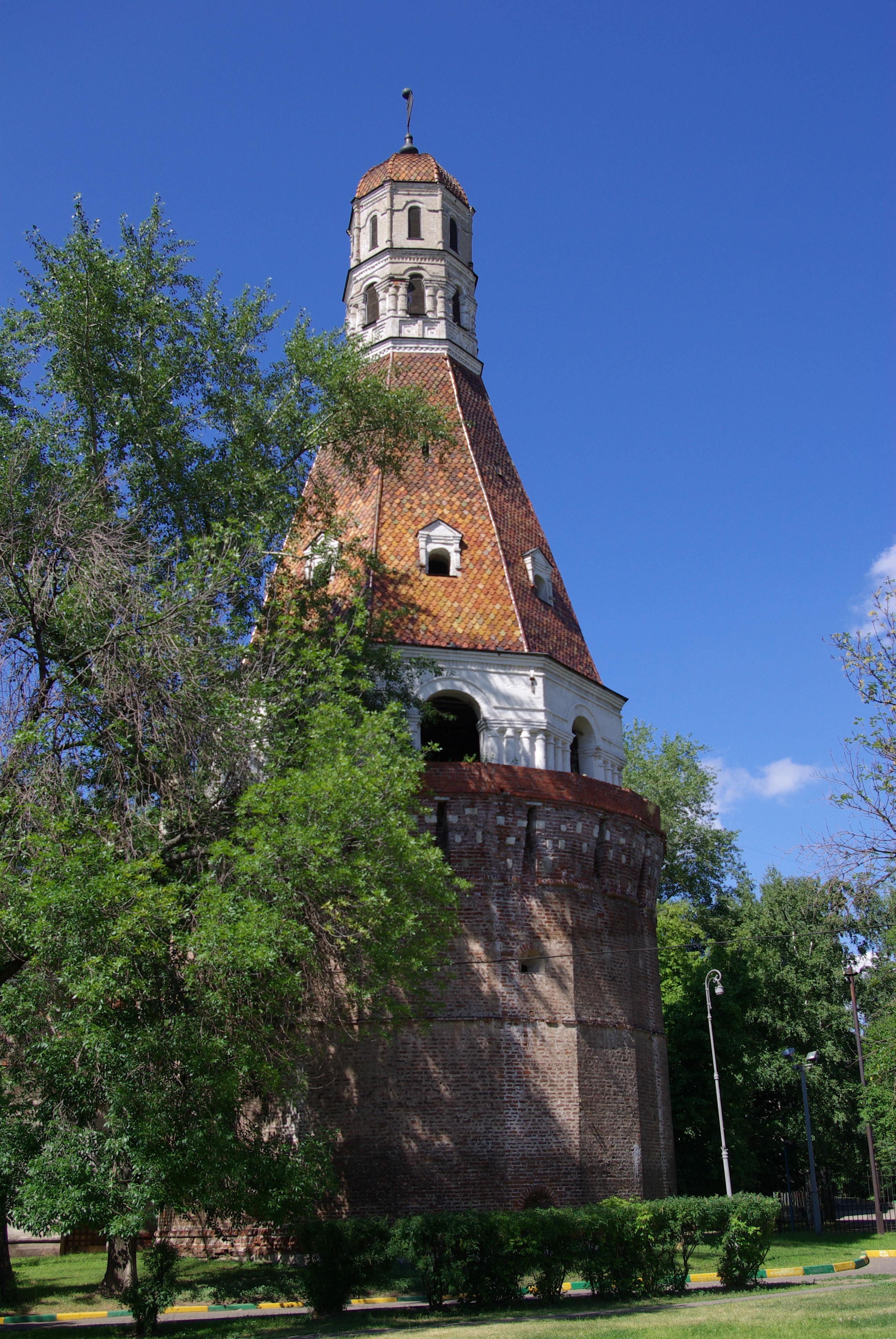 Москва. Симонов Монастырь. Moscow. Simonov Monastery